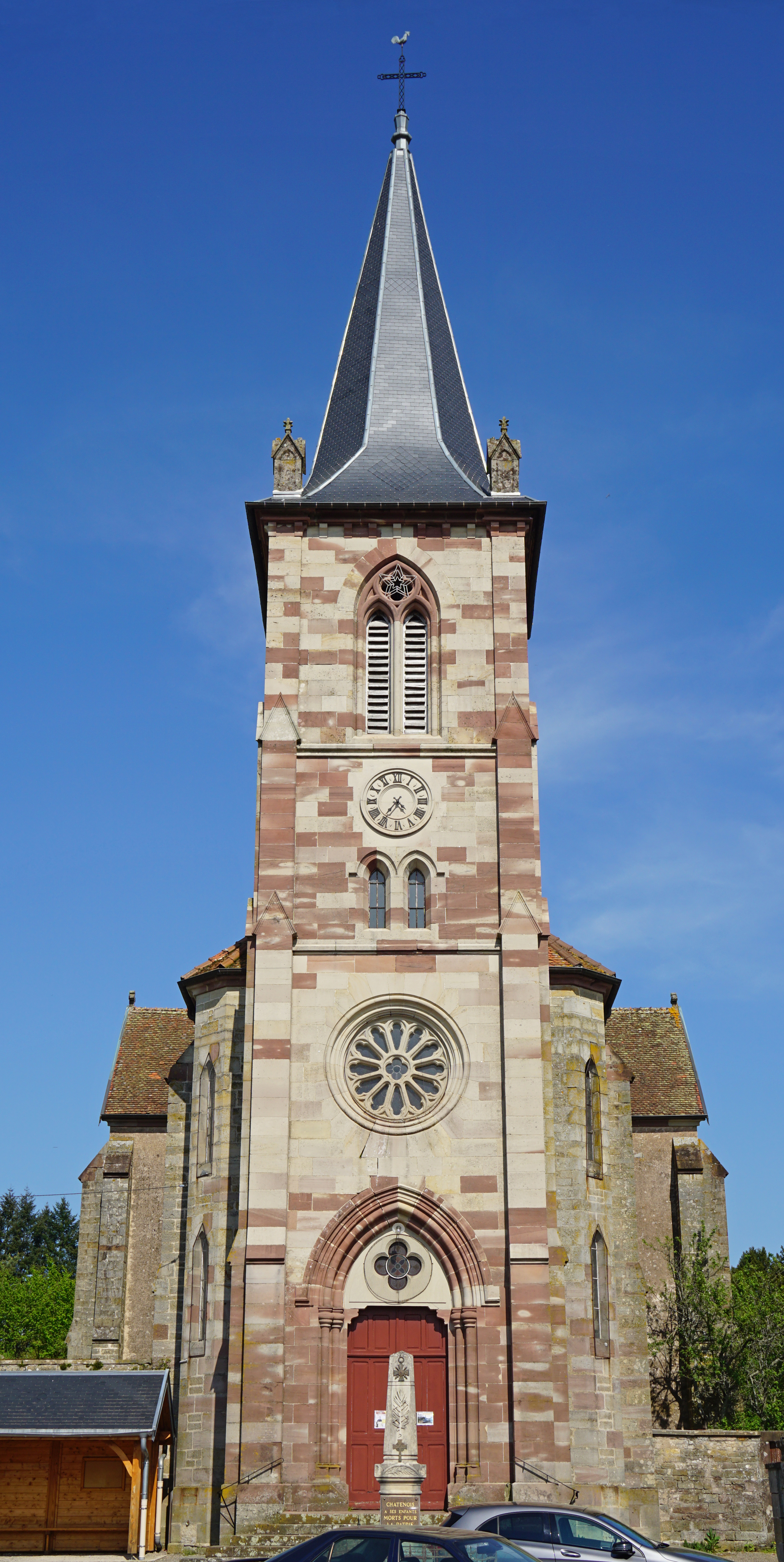 L'église de Châtenois en Haute-Saône.